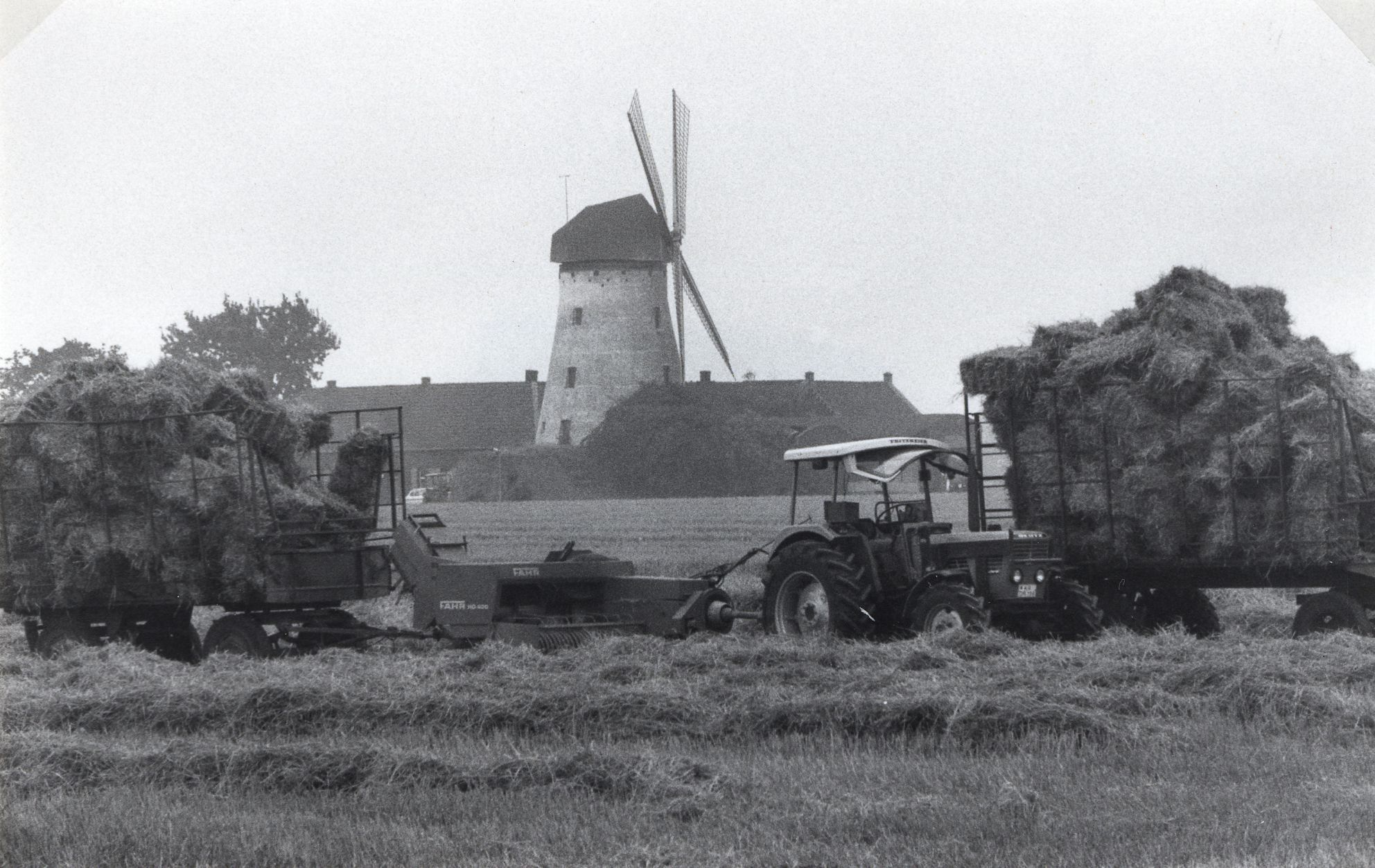 Deutz-Traktor und Fahr-Strohpresse mit Ballenschleuder und Gitterwagen (1982). Im Hintergrund die Elfrather Mühle in Krefeld-Traar